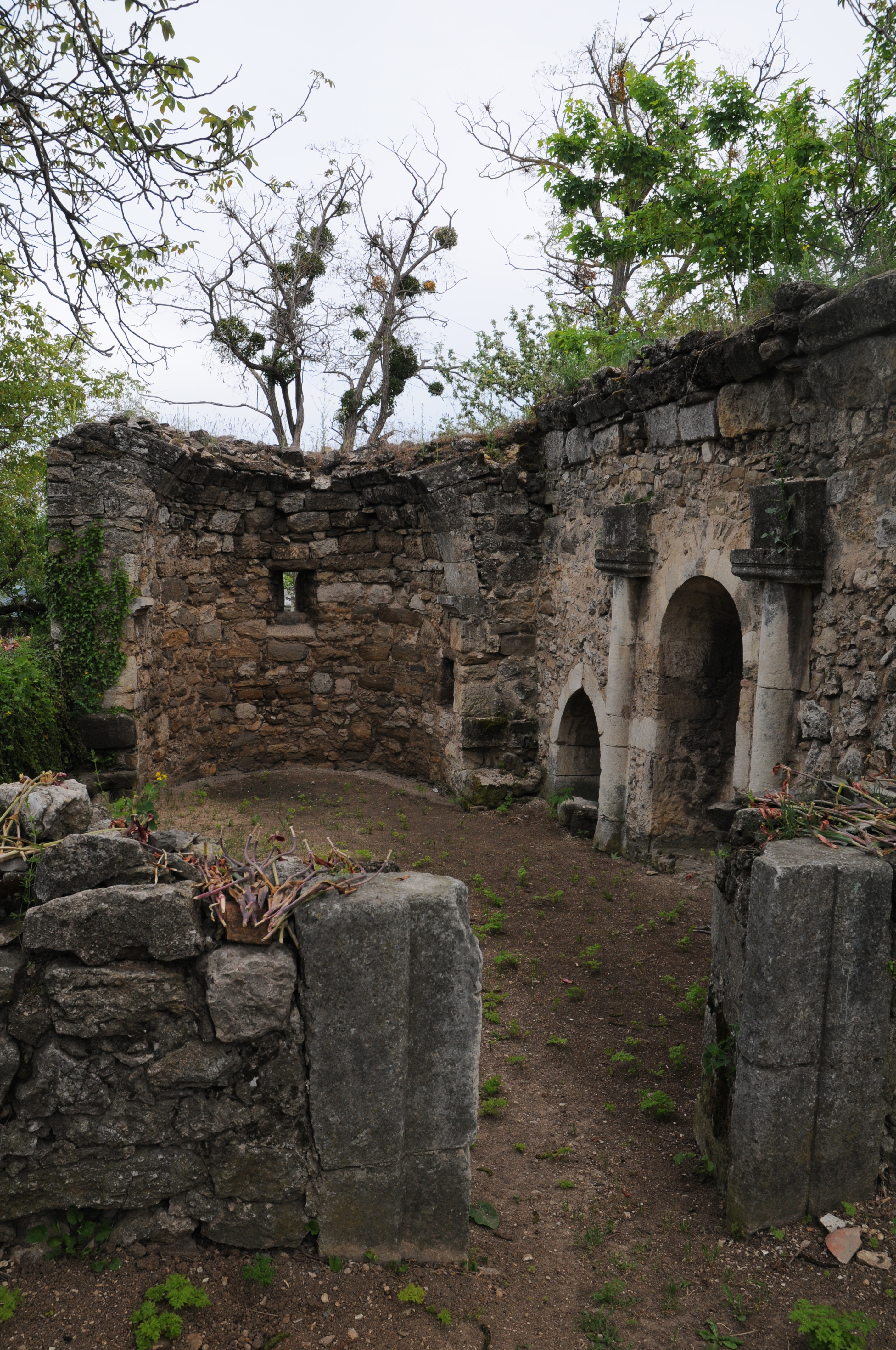 Старий Крим, Середньовічна церква Христа Спасителя (руїни)